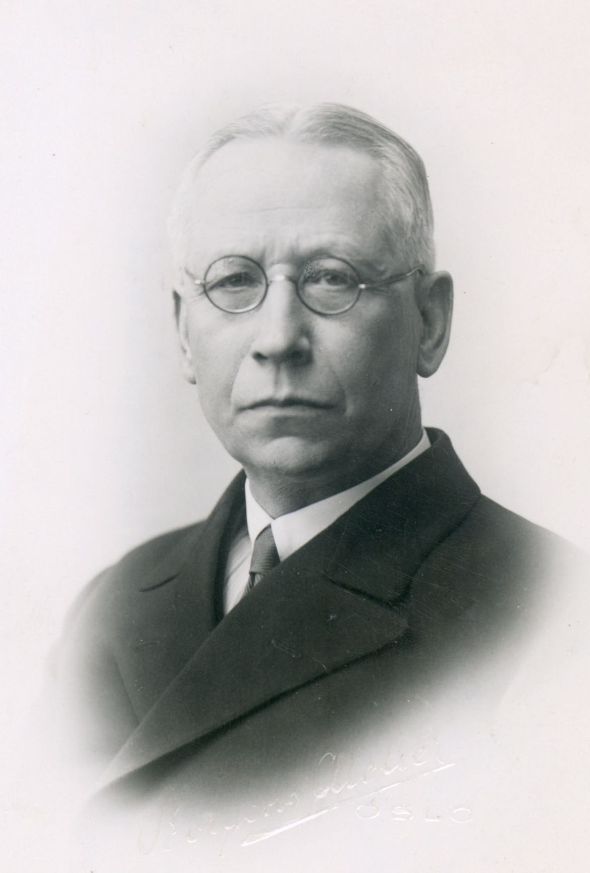 Norsk (bokmål): Stortingets portrett av Håkon Five.